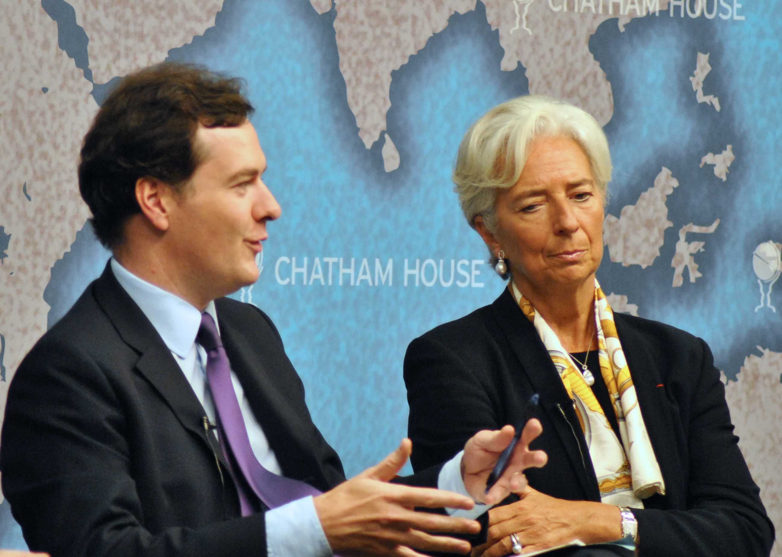 George Osborne and Christine Lagarde